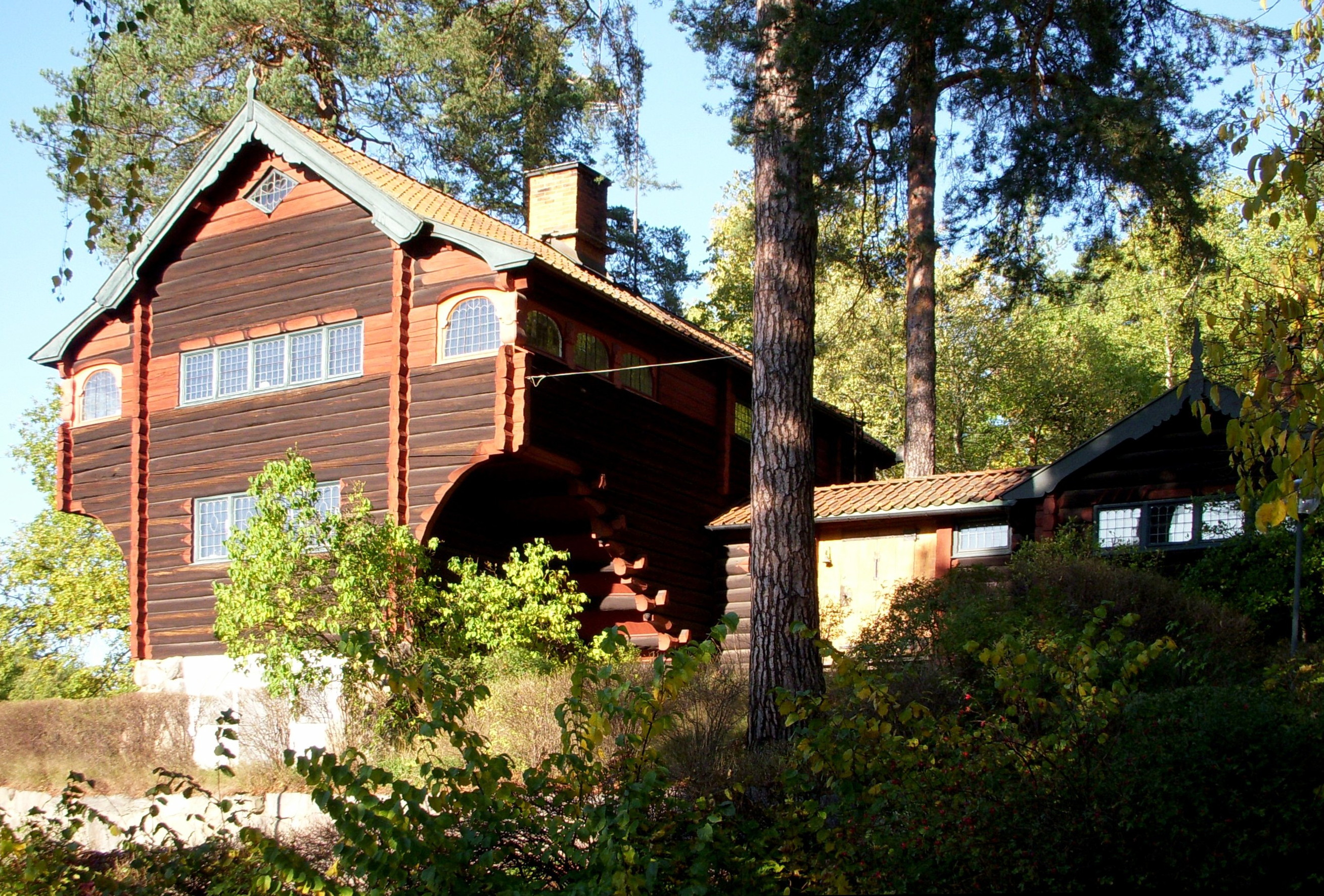 "Villa Tallom" i Stocksund, Danderyd